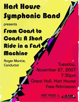 Fall 2007 Poster